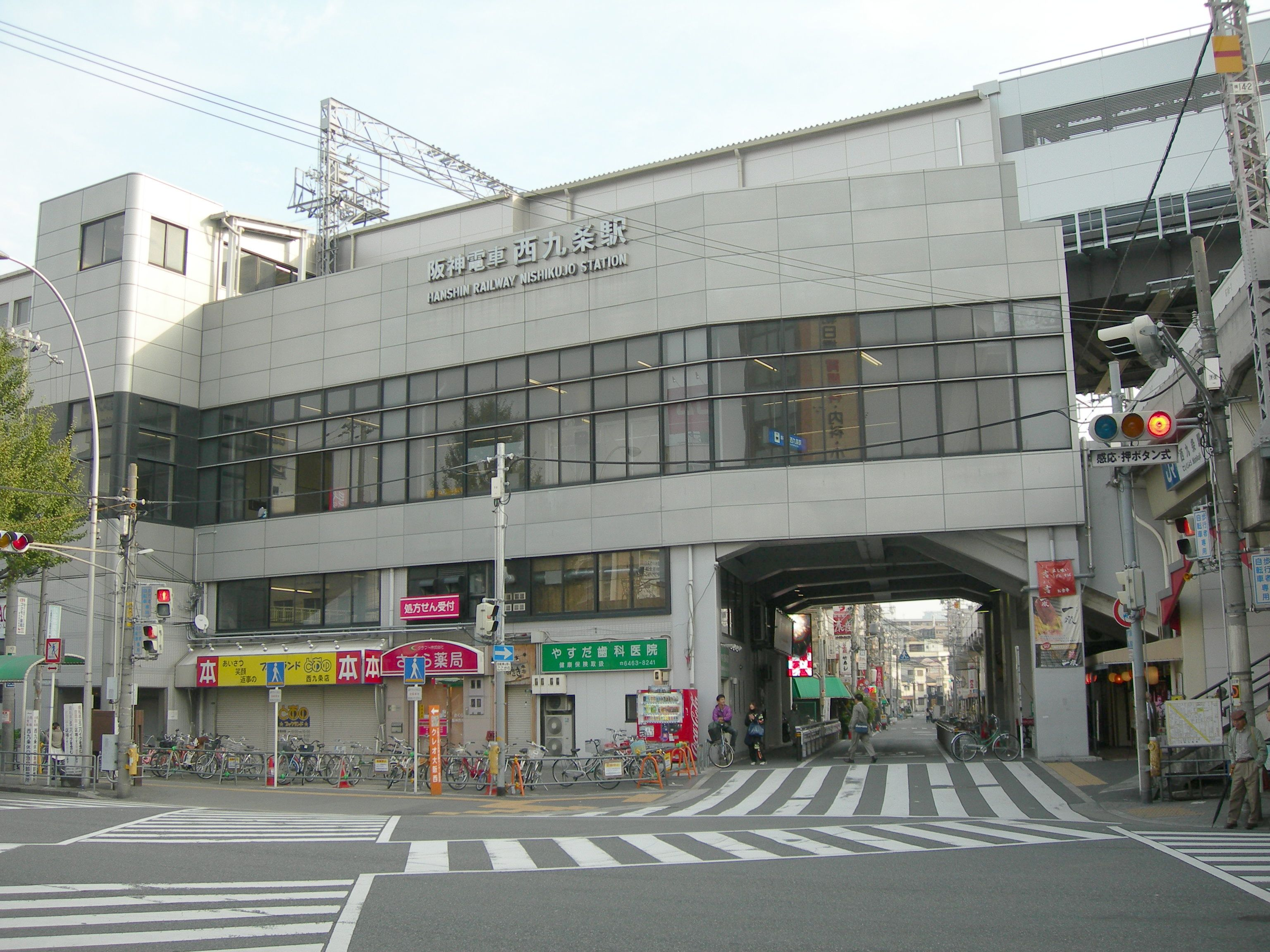 阪神 西九条駅